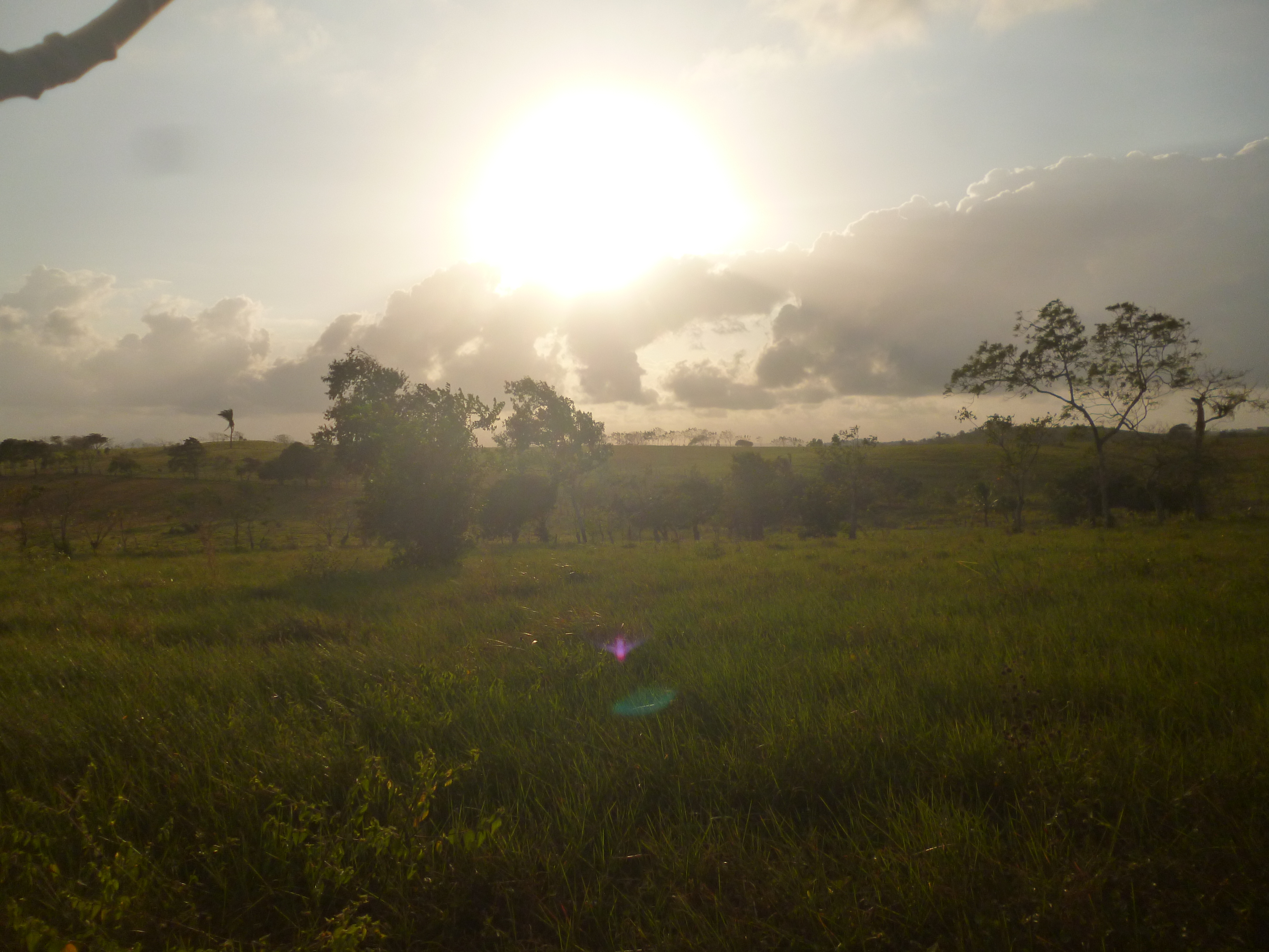 Corregimiento de Hurtado del distrito de La Chorrera en la provincia de Panamá Oeste, República de Panamá. Photo by: Benicio Cordonez